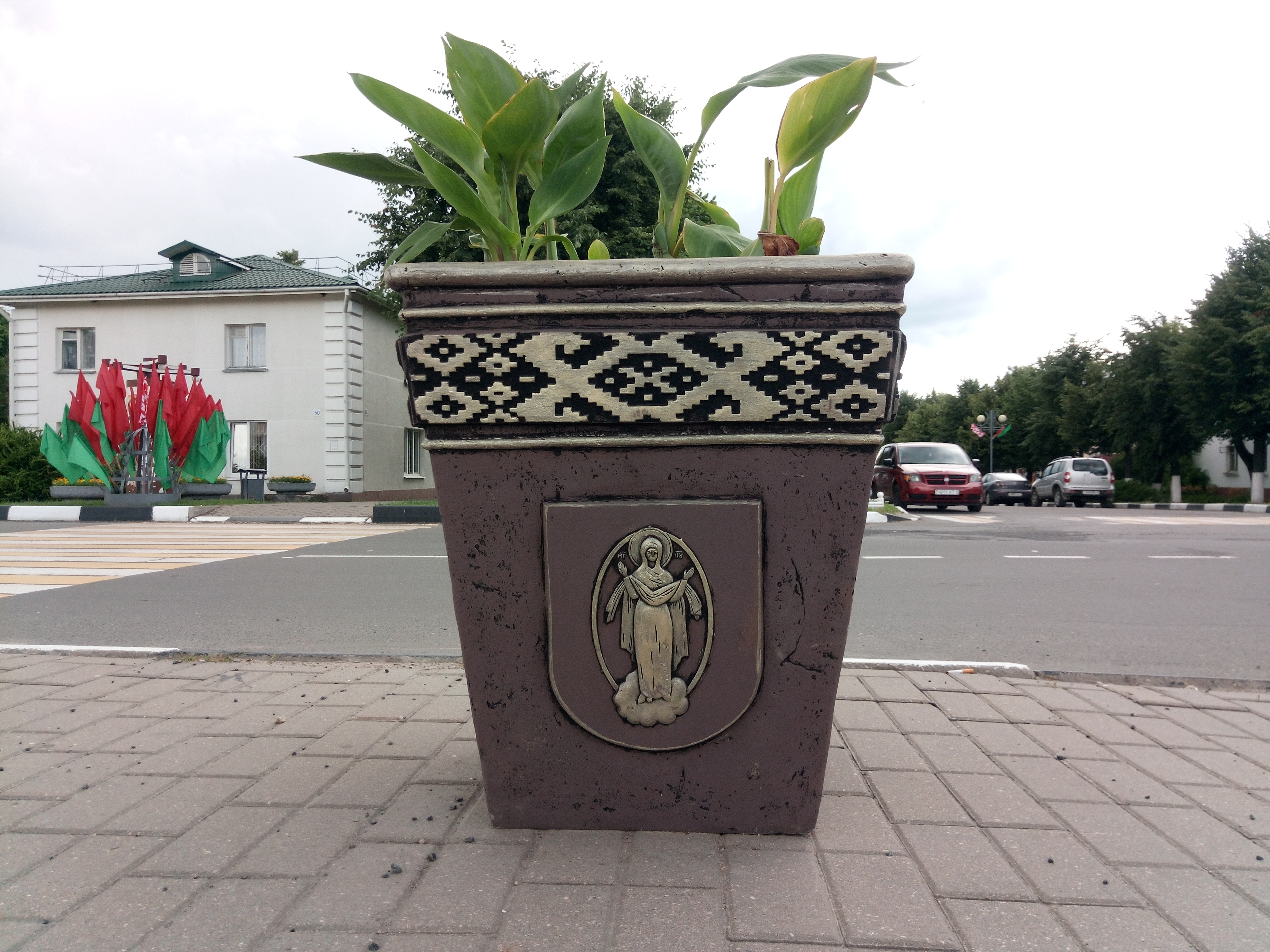 Кветнік з гербам горада.